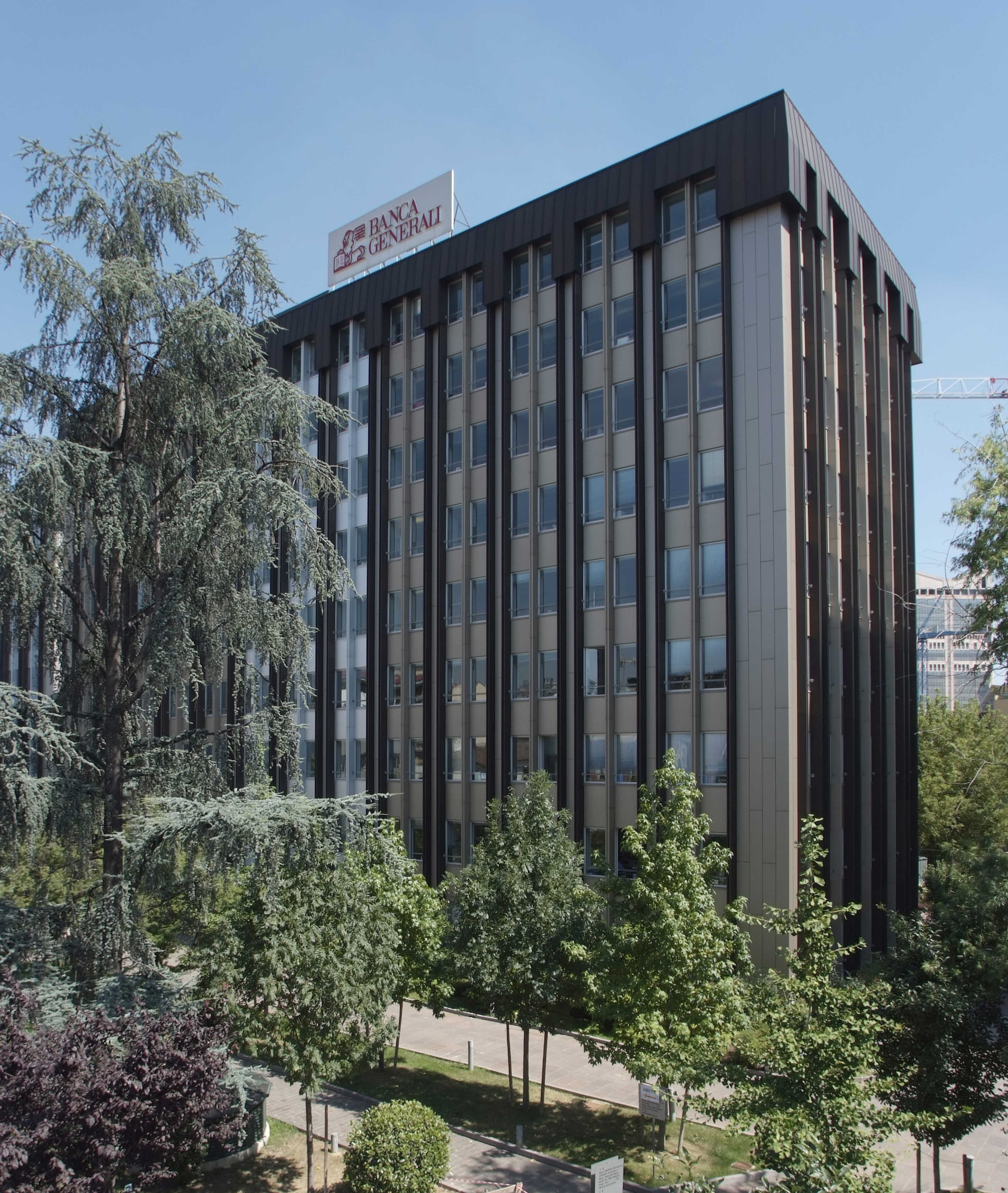 La sede di Banca Generali a Milano